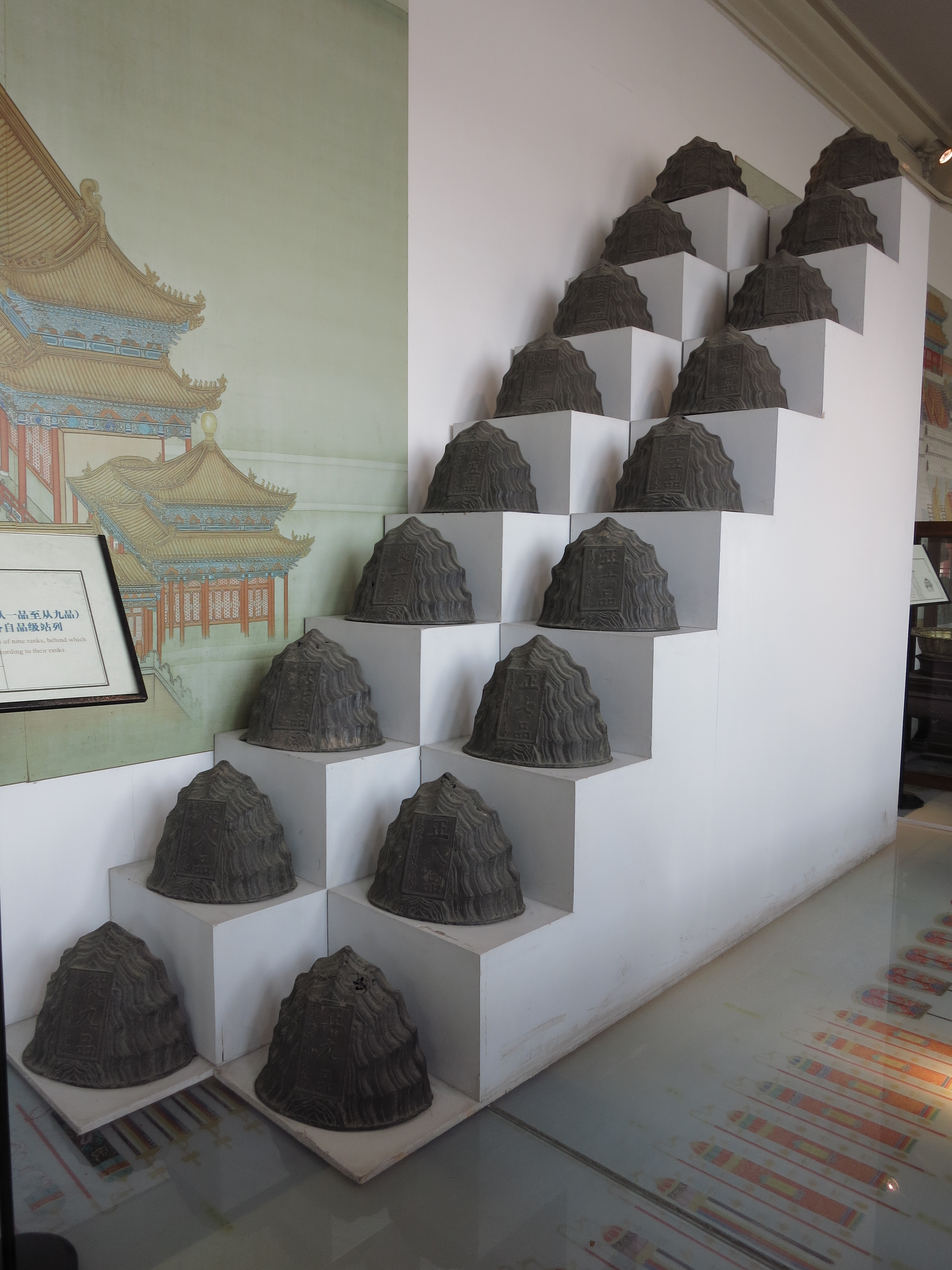 曾經列設於太和殿廣場的品級山,官員依據品級山標示位置根據自己的等級入位。现在太和门西庑的“清宫卤簿仪仗展”展出